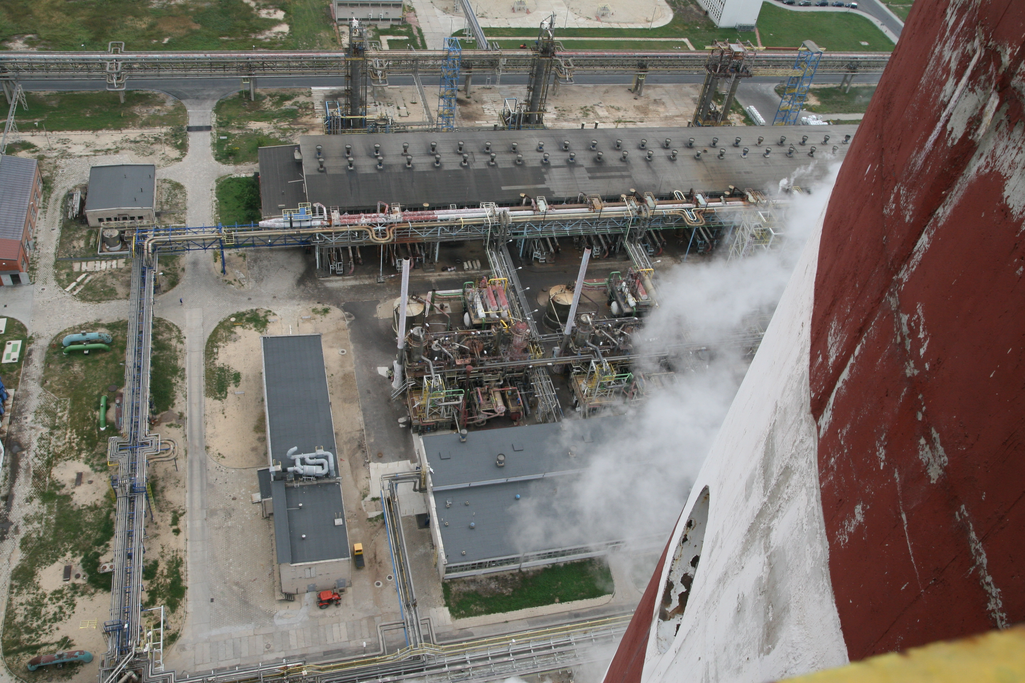 Instalacje produkcyjne w Grupie Azoty Zakładach Azotowych "Puławy" S.A.